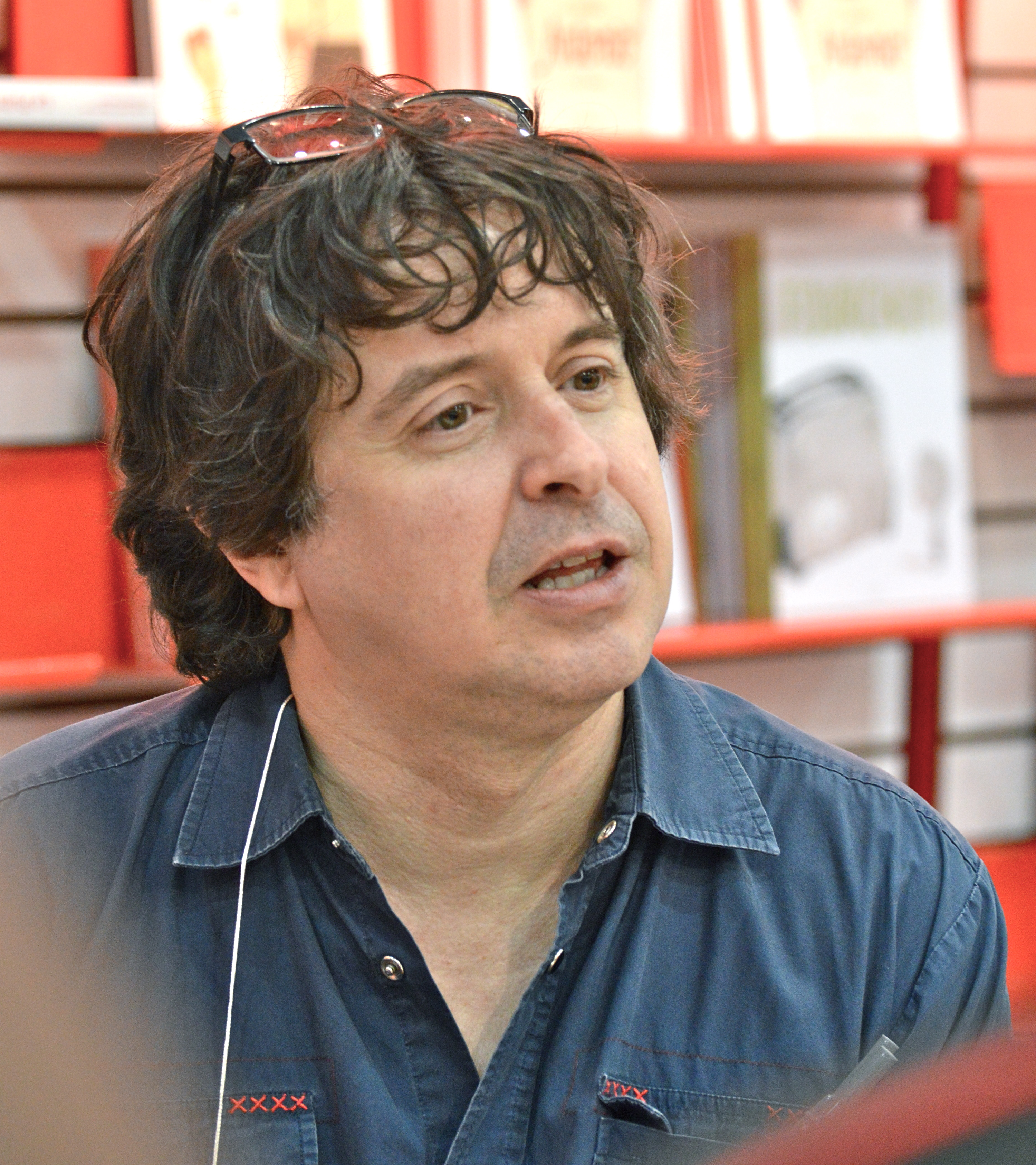 Yves Pelletier au Salon international du livre de Québec 2015